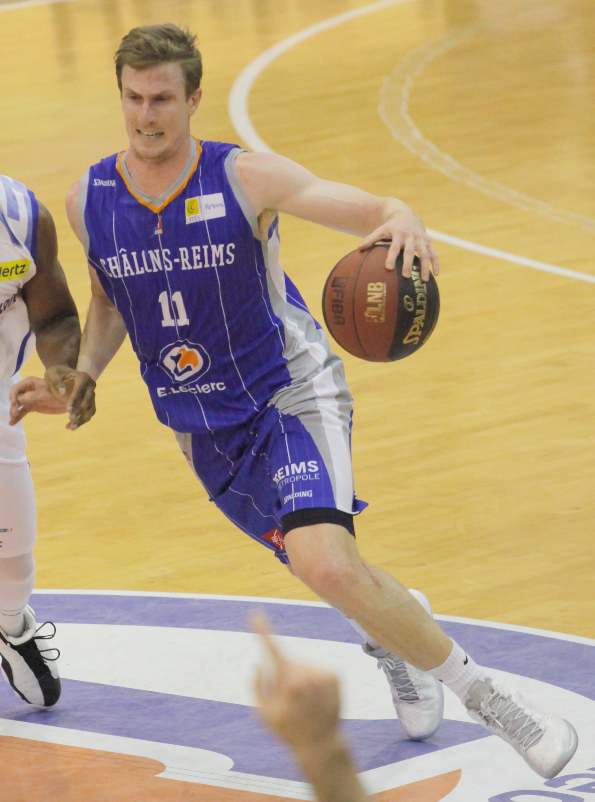 Mark Payne sous les couleurs de Châlons-Reims